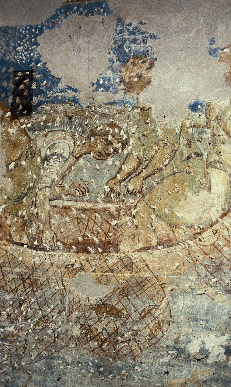 Явление Христа апостолам на море Тивериадском. Фрагмент фрески храма Спаса-Преображения на Берестове. Киев.